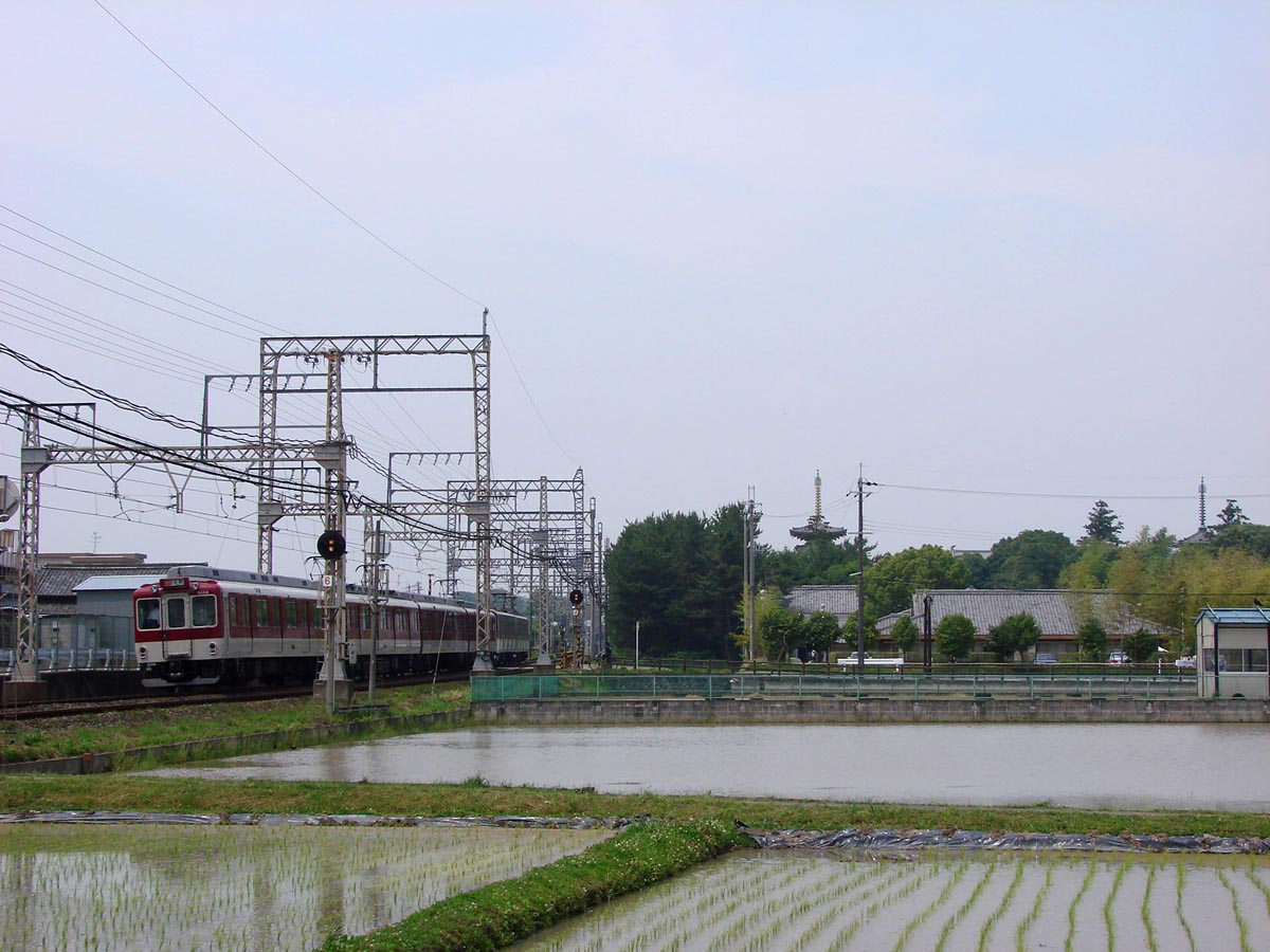 近鉄 8400系（橿原線西ノ京駅 薬師寺付近）